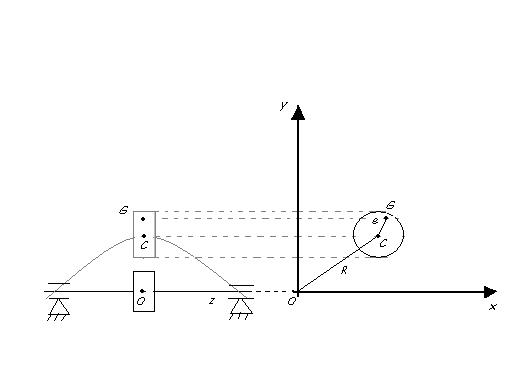 è una proiezione sugli assi cartesiani di un rotore di jeffcott durante la deformazione